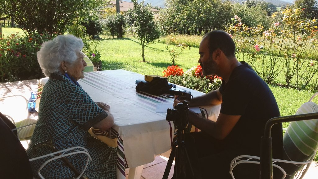 Oskar Alegria kazetari eta zinemagilea 100 urteko Libe Asua elkarrizketatzen Larrabetzun.